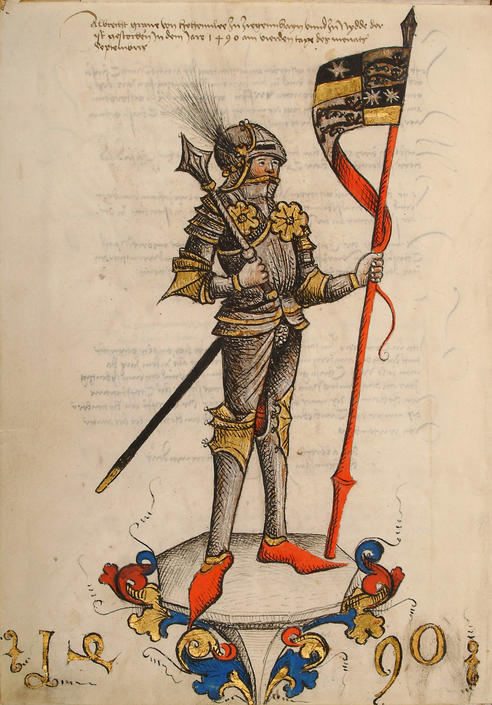 Lehenbuch des Grafen Albrecht von Hohenlohe und Ziegenhain, Darstellung des Grafen mit Fahne (HZAN)